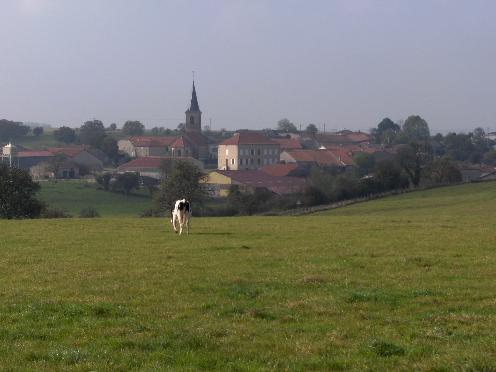 Le village de Mandres-en-Barrois (Meuse, France)